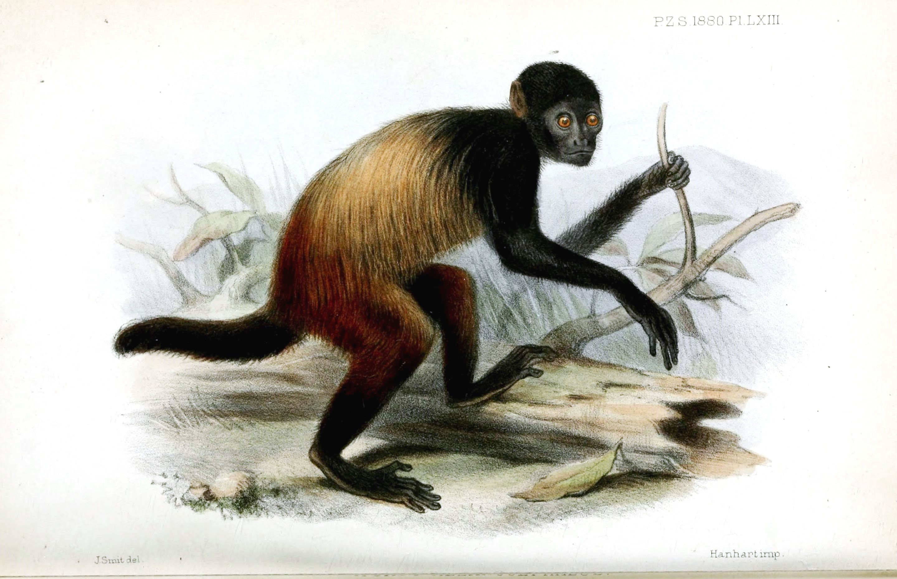 X CO CO I C ■ Si